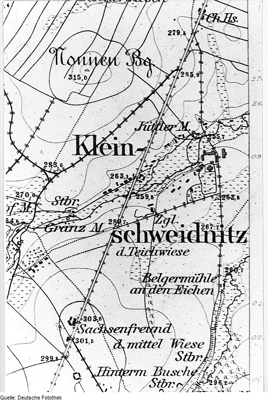 Original image description from the Deutsche Fotothek Großschweidnitz-Kleinschweidnitz. Meßtischblatt, Sekt. Neusalza, 1883